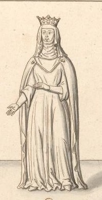 Clémence d'Anjou